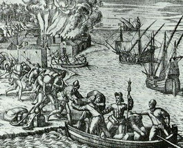 Jacques de Sores sacks Havana